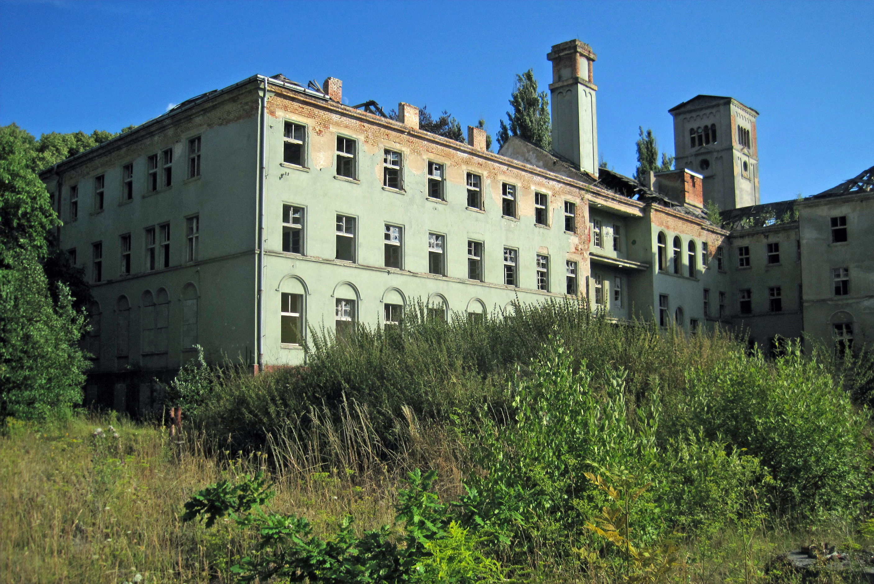 Cheb - klášter Milosrdných sester svatého Kříže v ulici 17. listopadu 34 na jihozápadním okraji města